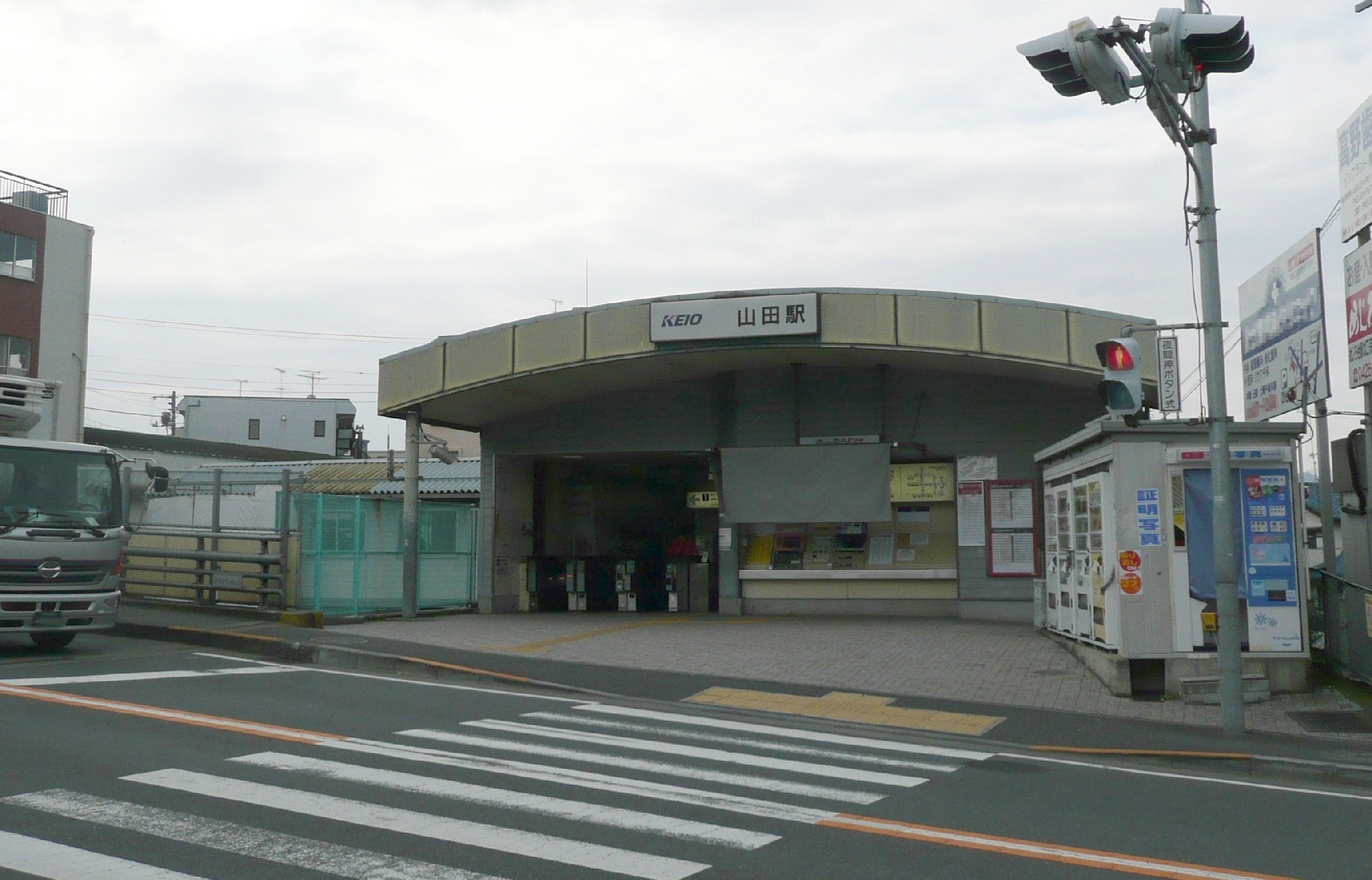 山田駅 (東京都)